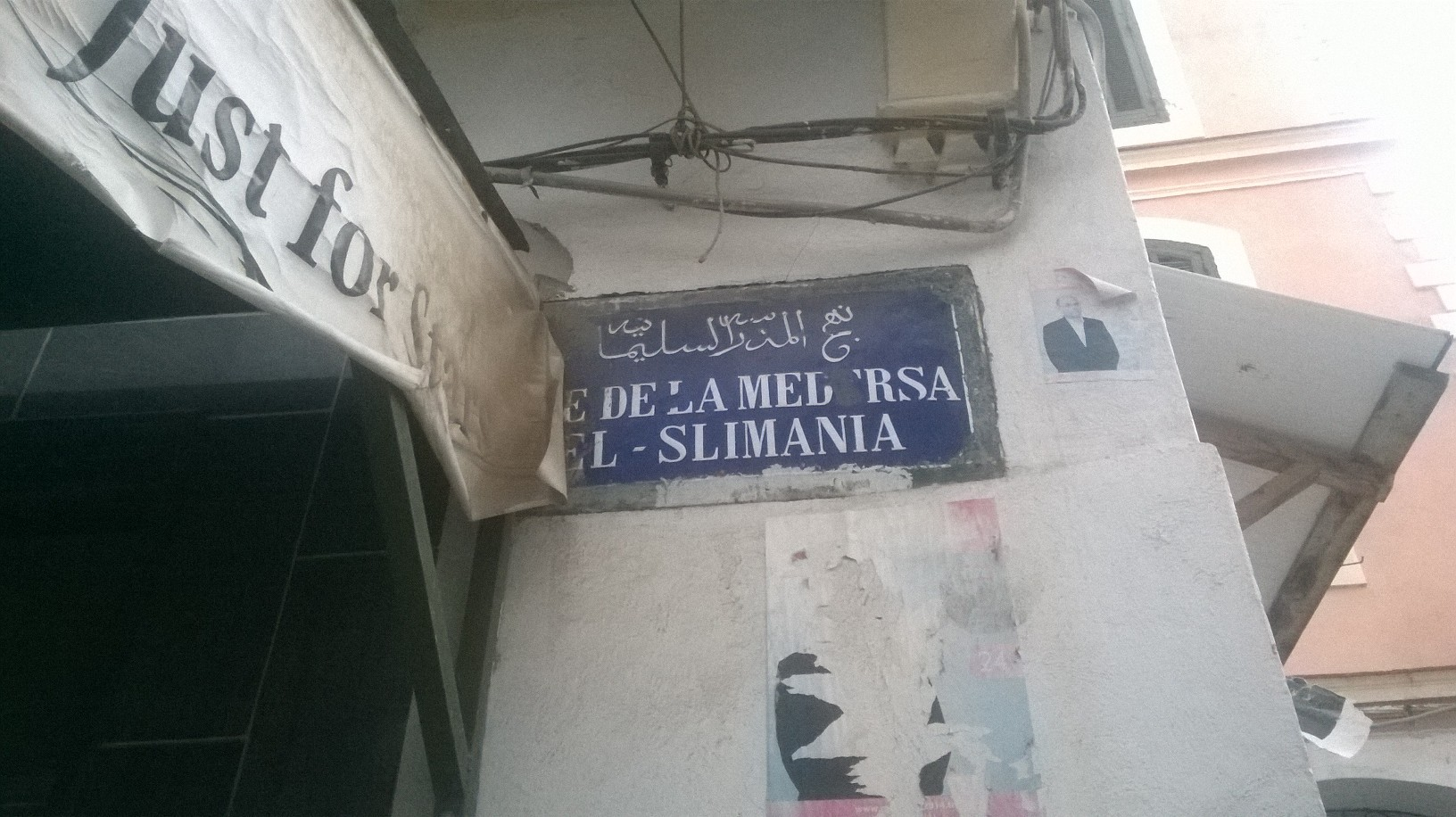 La médina de Tunis مدينة تونس العتيقة